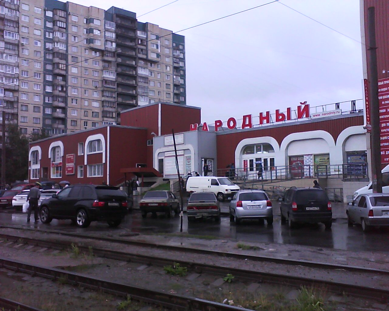 Универсам «Народный» (Санкт-Петербург)